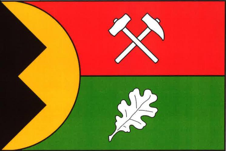 Svatá, okres Beroun, vlajka